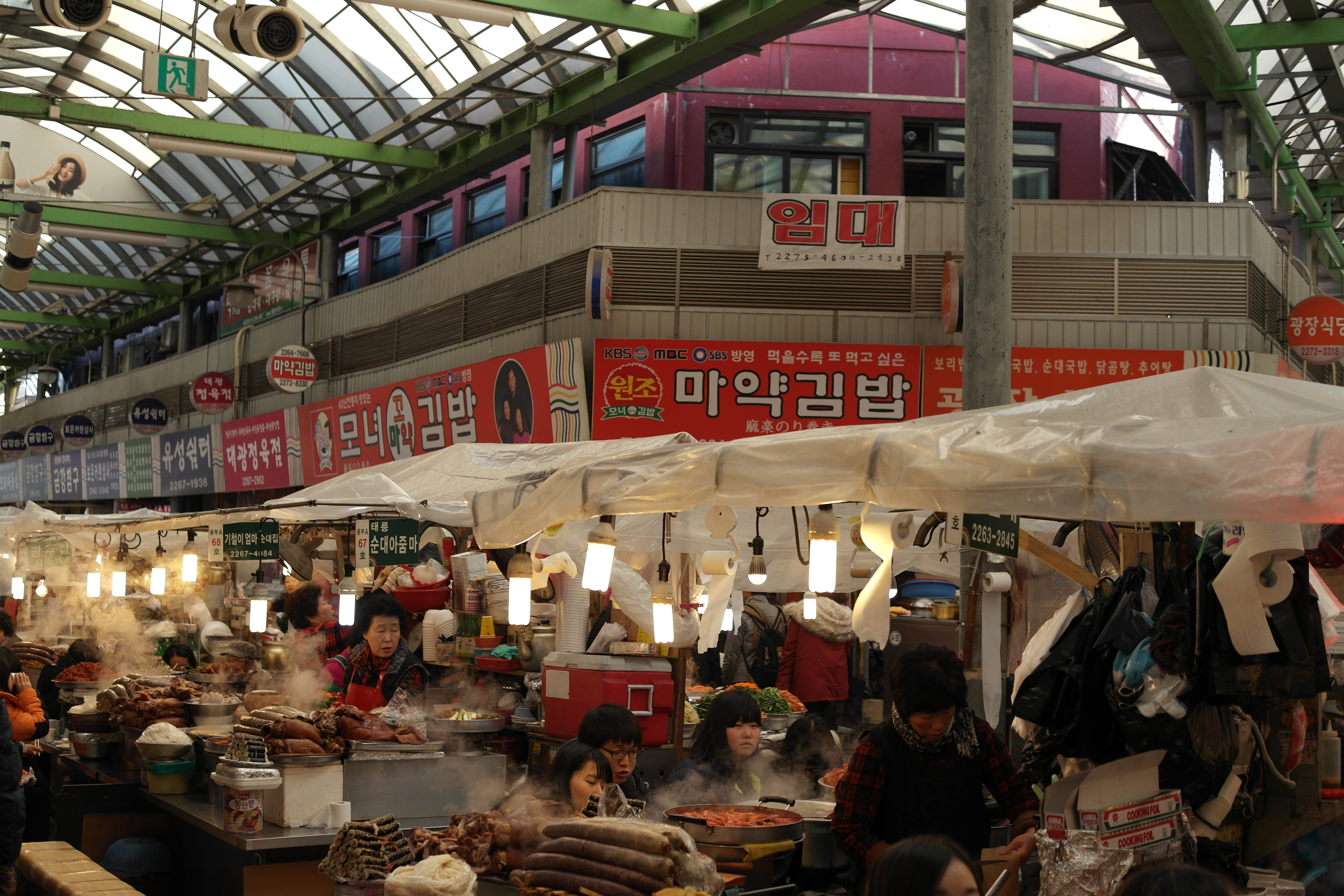 종로 광장시장